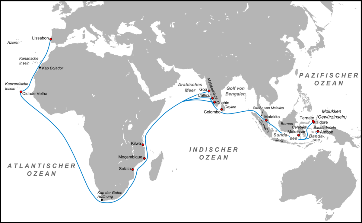 Karte der portugiesischen Gewürzroute im 15. und 16. Jahrhundert